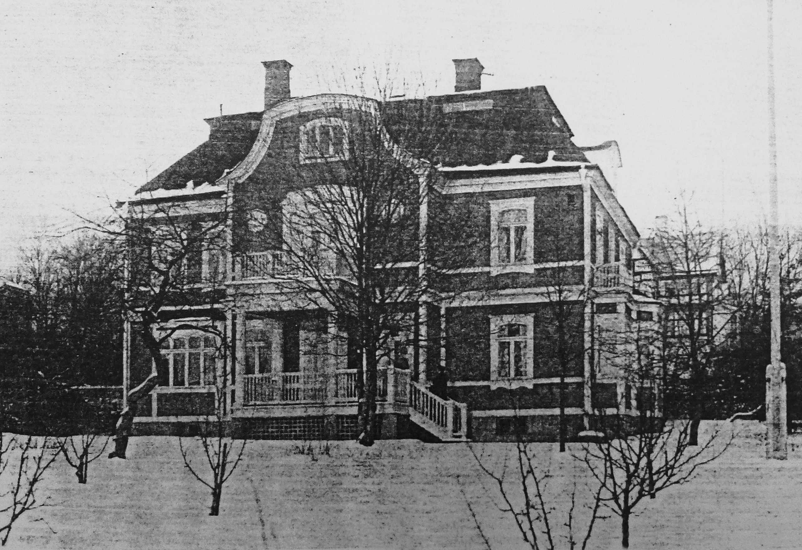 "Grottevillan" (Germaniavägen 14) ur Svenska Hem på 1910-talet